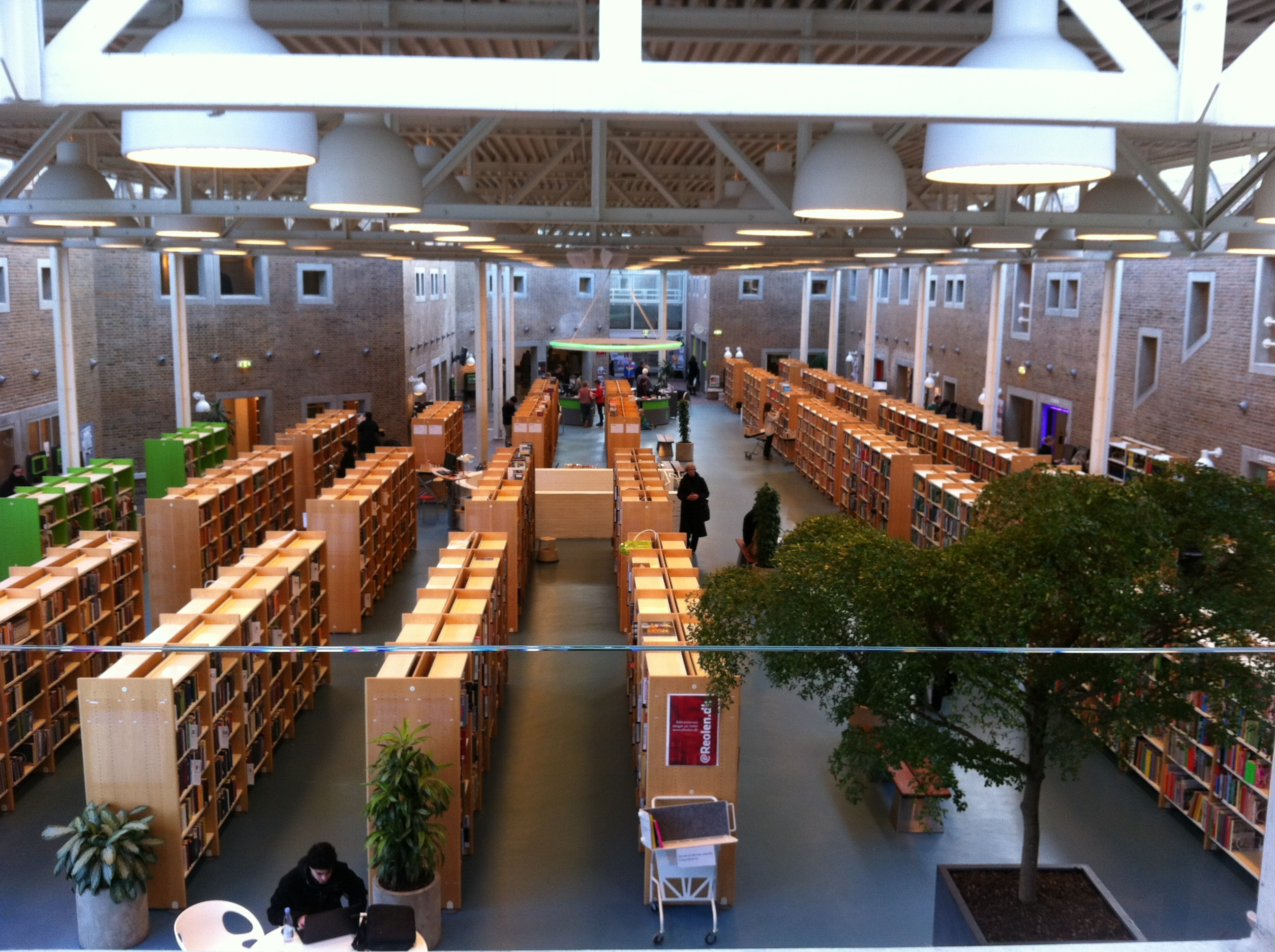 Aalborg bibliotek hovedbiblioteket